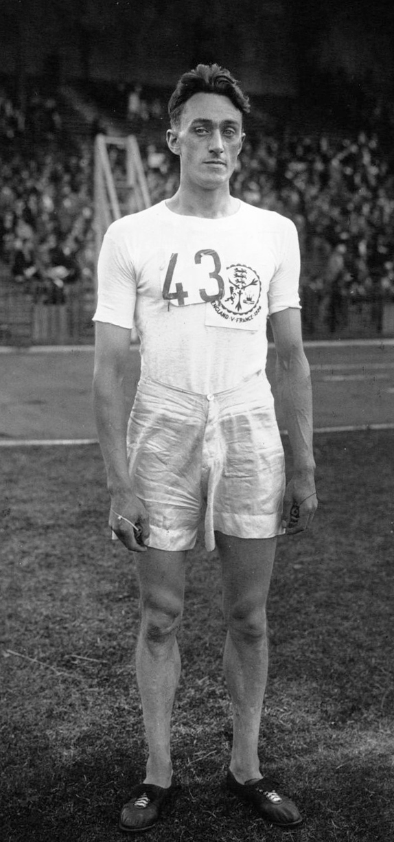 Colombes : match d'athlétisme France Angleterre : Gaby (anglais) gagnant du 110 m. haies (portrait) : [photographie de presse] / Agence Meurisse